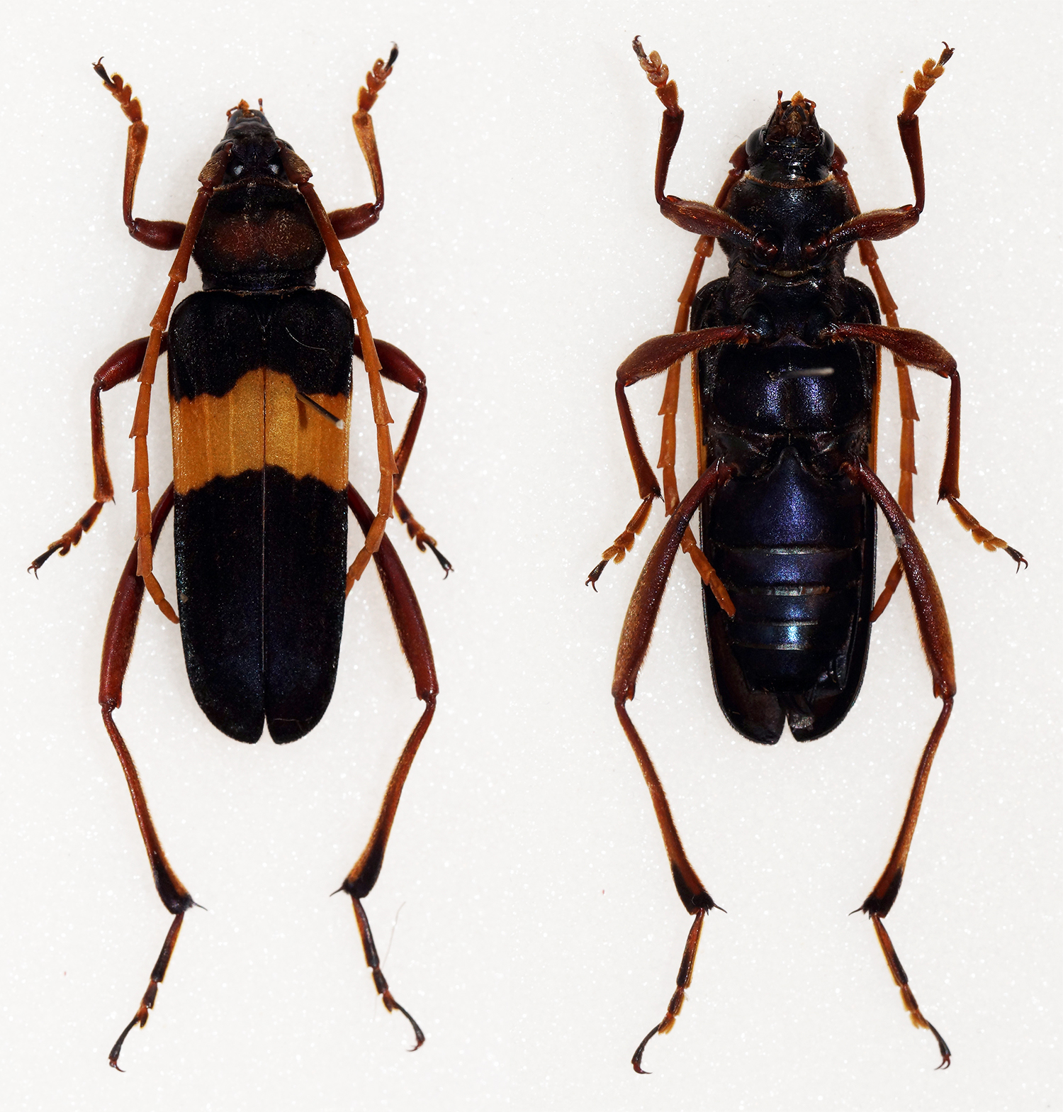 Bentanachs,2005 Sex: ? Data: 06-2014 - Mt Phu Pane - Hua Phan Province - NE Laos Size: 27.5mm